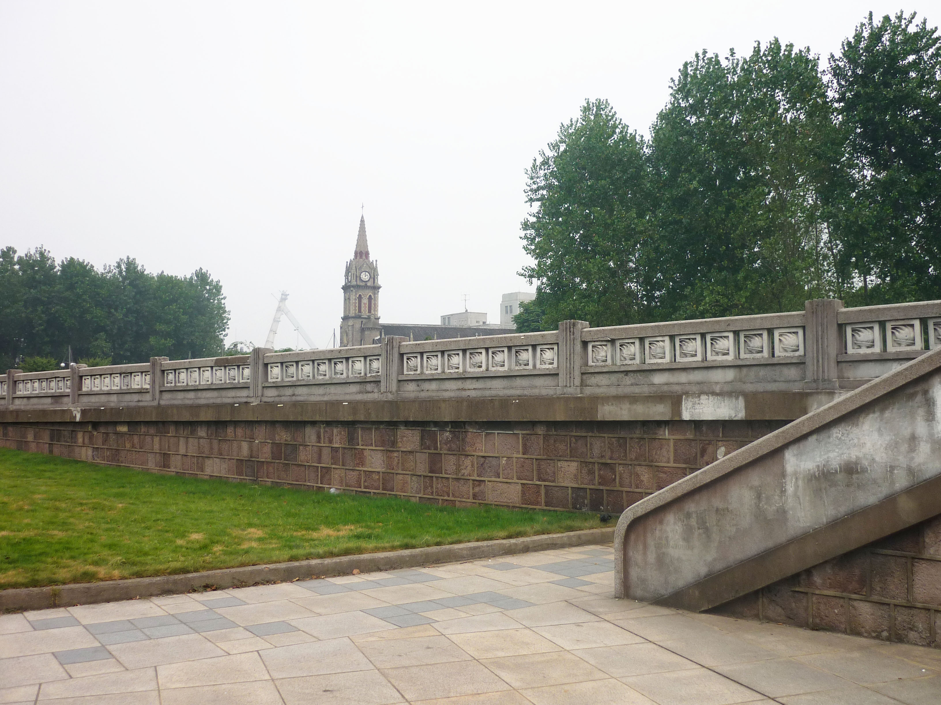 宁波新江桥老桥残余部分